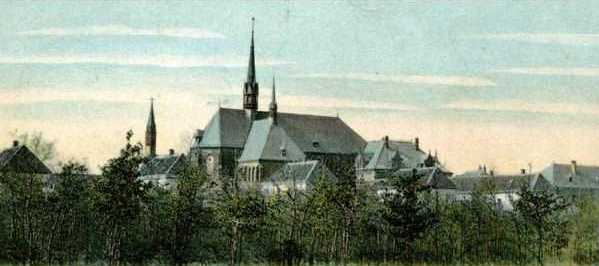 Die Kartause Maria Hain in Düsseldorf auf einer Postkarte aus dem Jahr 1904